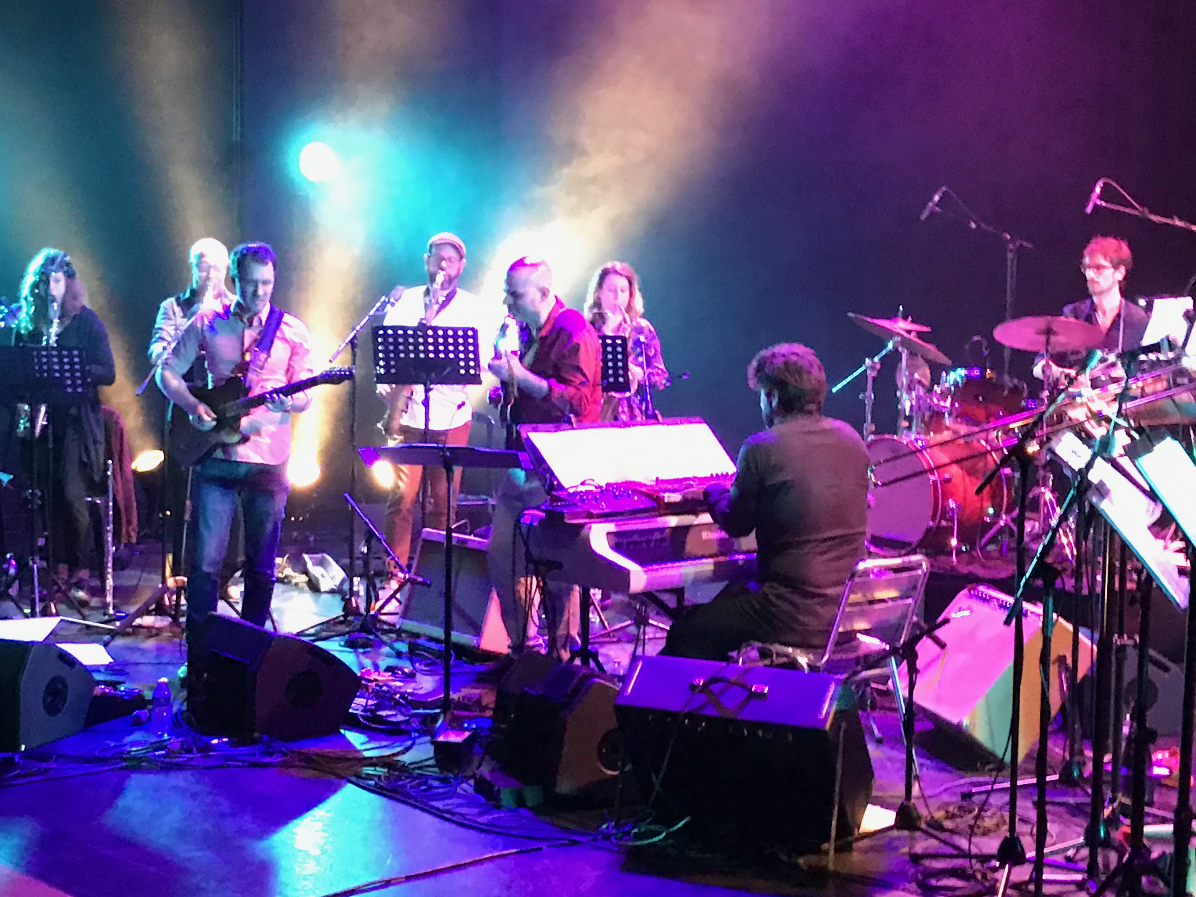 Concert d'avril 2019 au théâtre de Fontblanche, Vitrolles (France), pour le spectacle Dancing in your Head(s) : La Galaxie Ornette